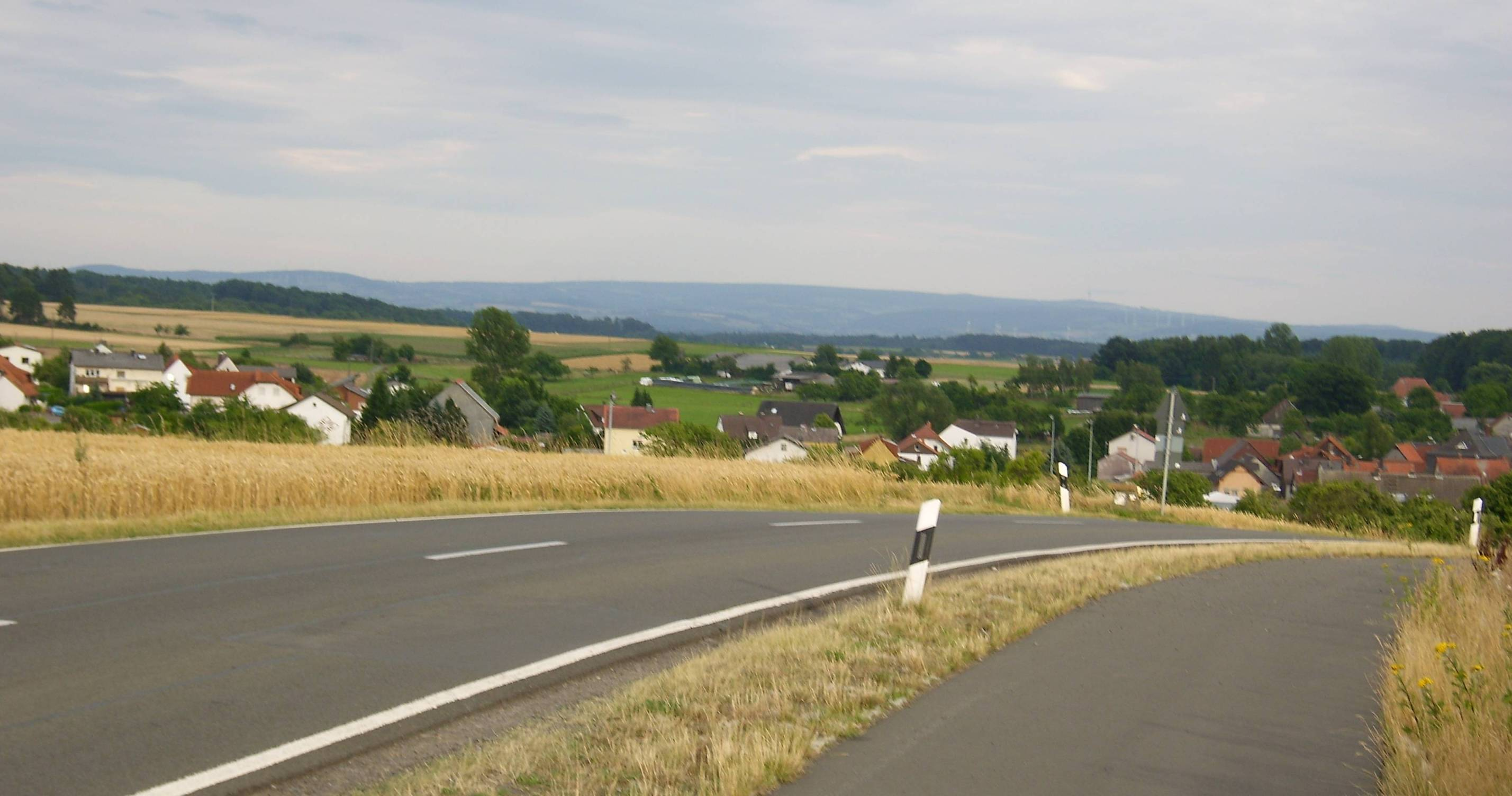 Blick vom Vorderen Vogelsberg (Lumda-Plateau) zwischen Wermertshausen und Rüddingshausen zum "eigentlichen" Vogelsberg (773m)